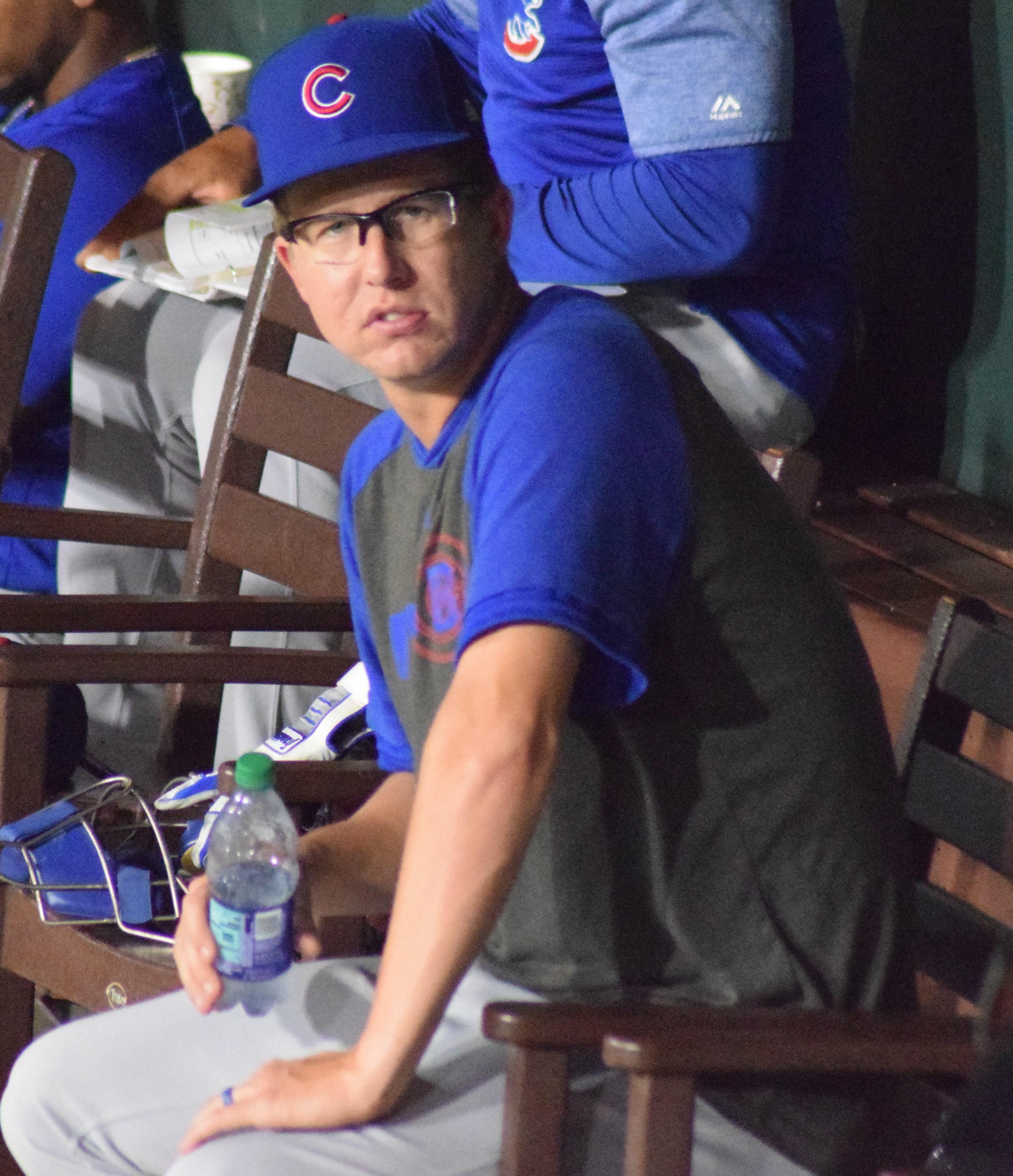 Alec Mills